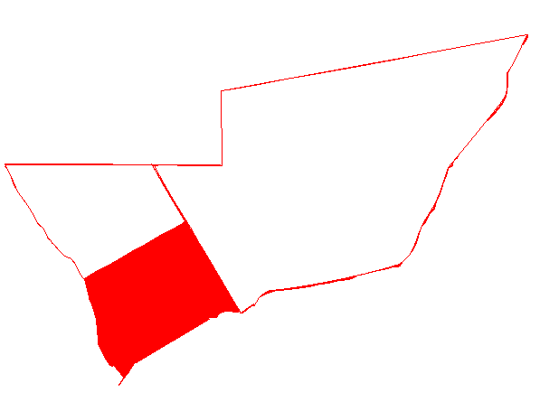 Localización de la parroquia Manuel Manrique en el municipio Simón Bolívar Zulia, Venezuela